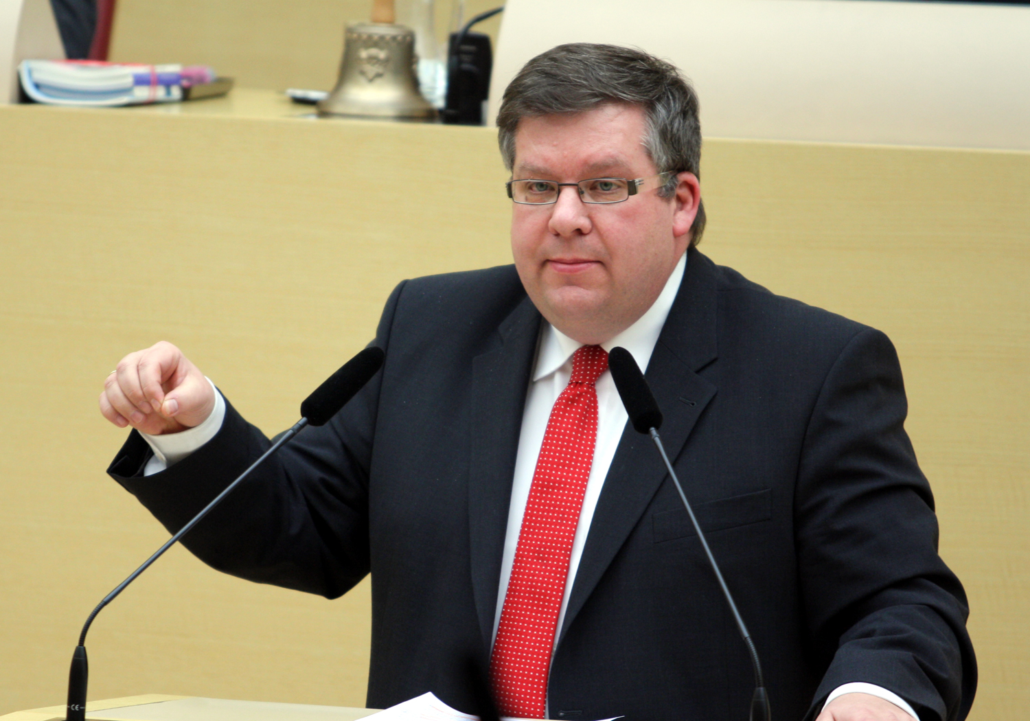 Volkmar Halbleib, bayerischer Politiker (SPD) und Mitglied des Bayerischen Landtages. Hier am 14.02.2012 während einer Rede im Bayerischen Landtag (Maximillianeum, Plenarsaal).